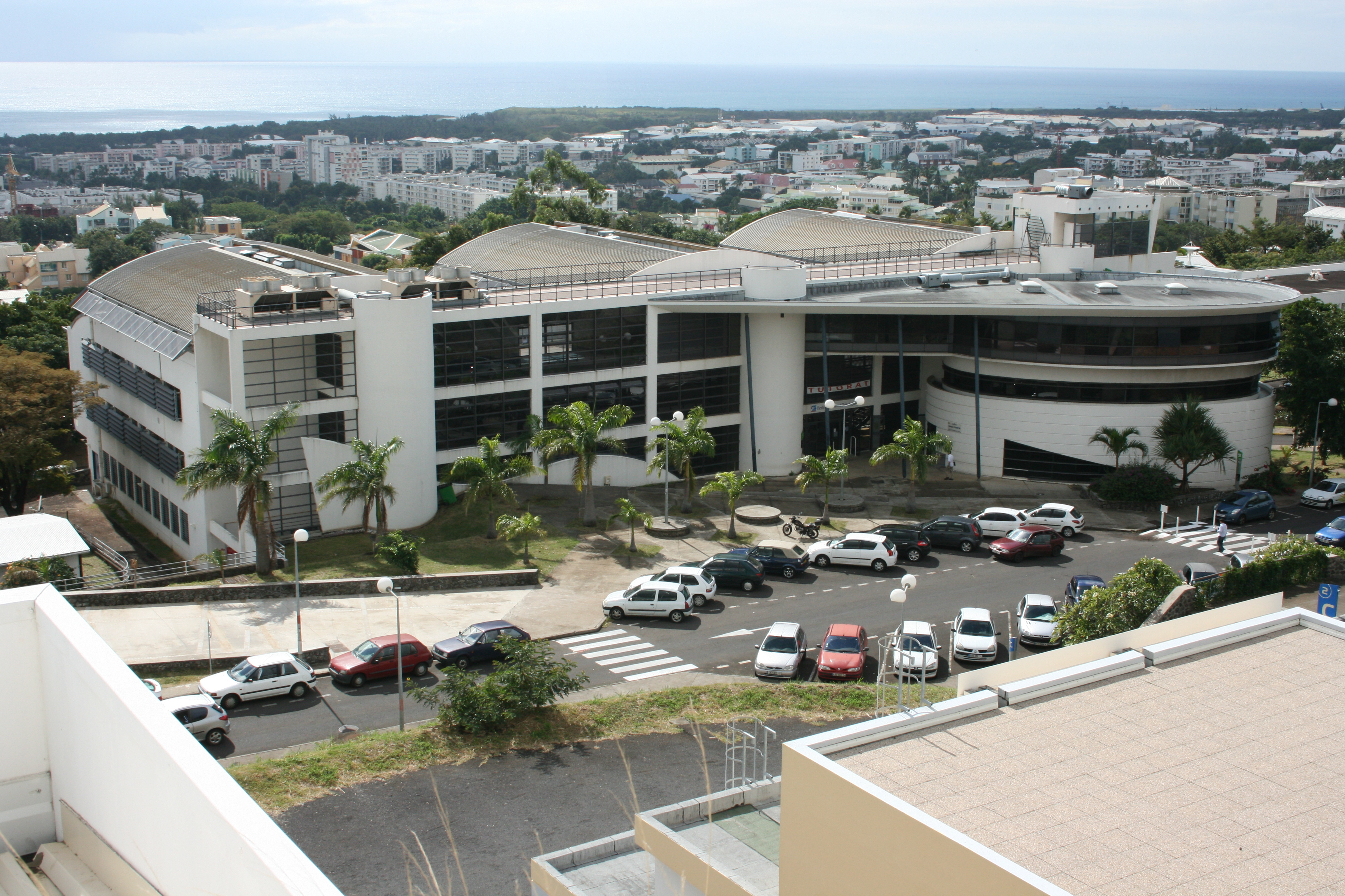 Le bâtiment principal de la faculté des Sciences de l'université de la Réunion, au Moufia